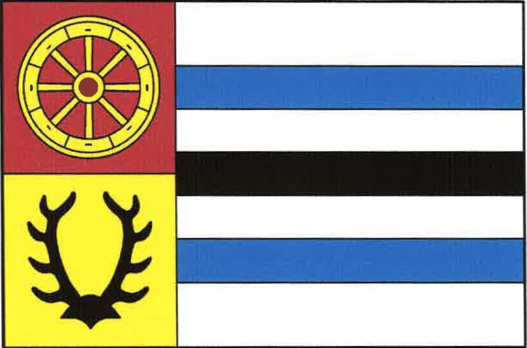 vlajka, Úherce, okres Plzeň-sever